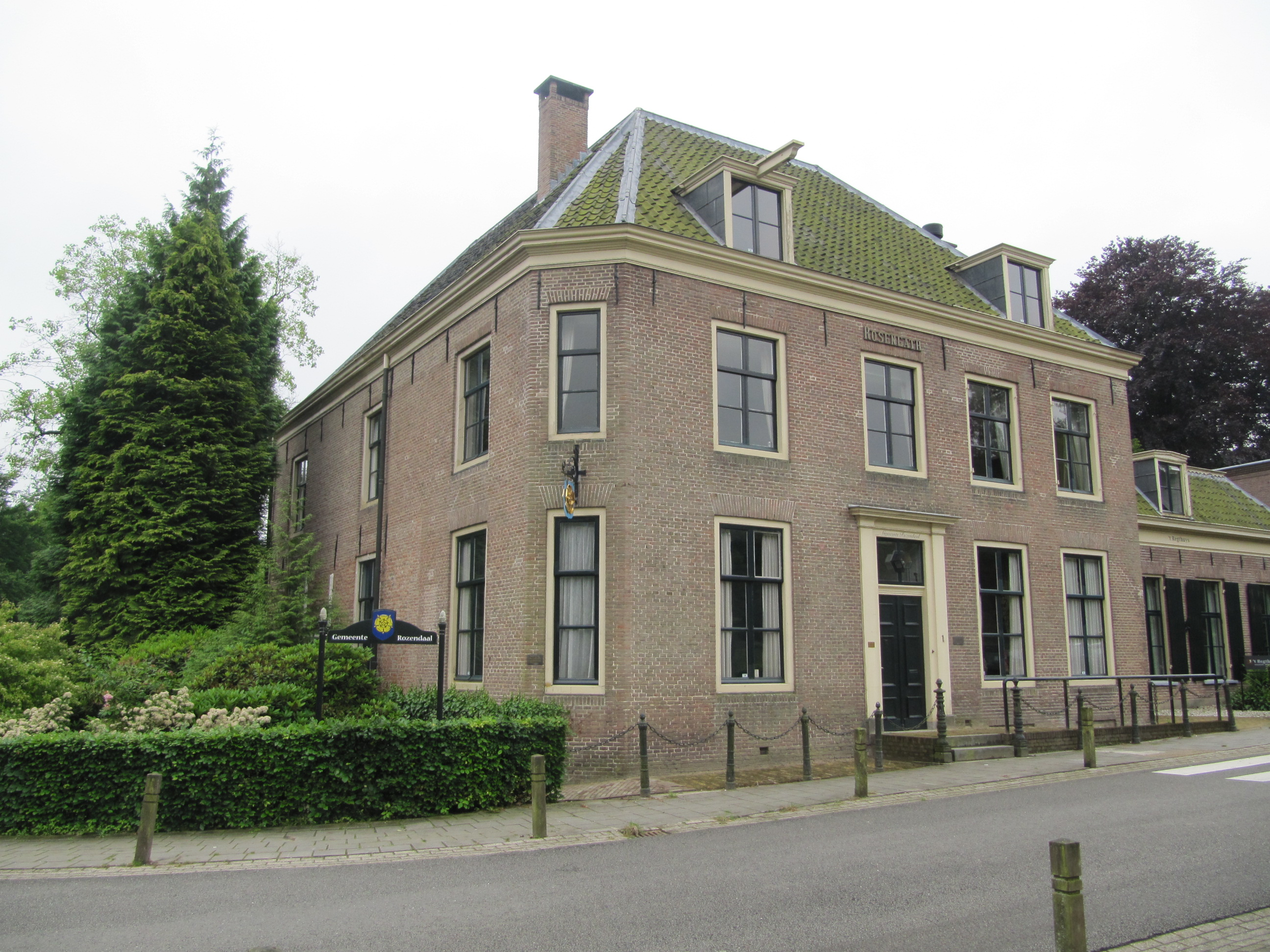 Kasteel en landgoed Rosendael